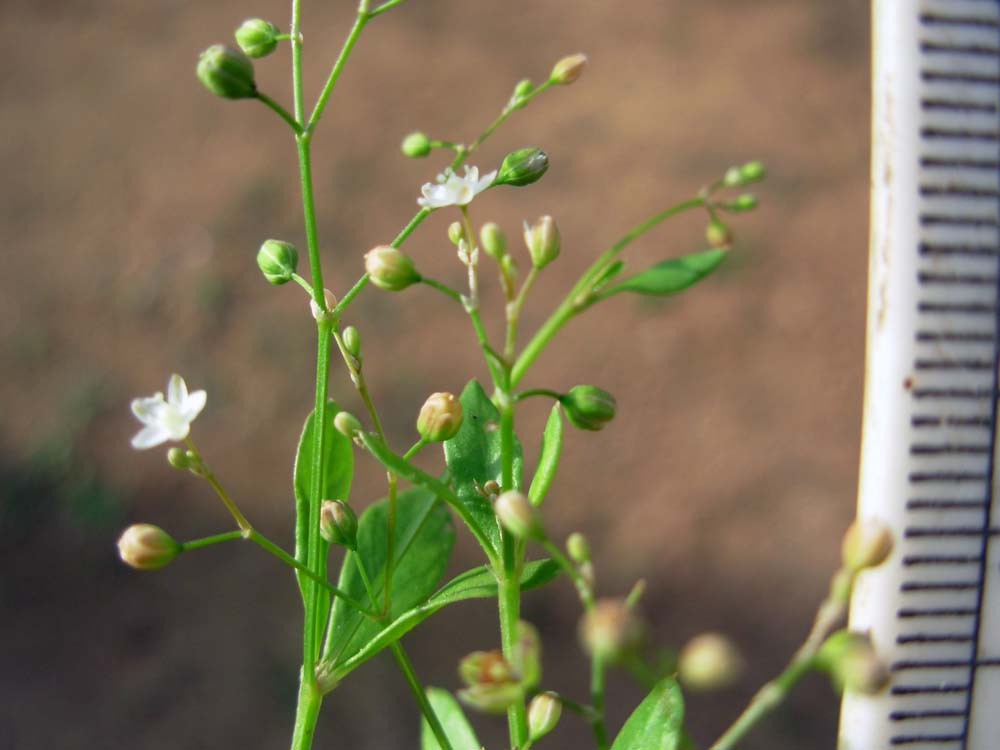 വെള്ള തഴുതാമ (തമിഴാമ)